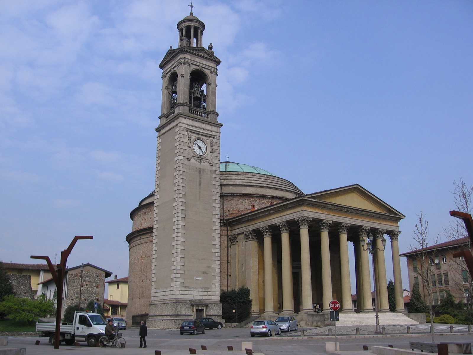 Ghisalba, Bergamo, Italia